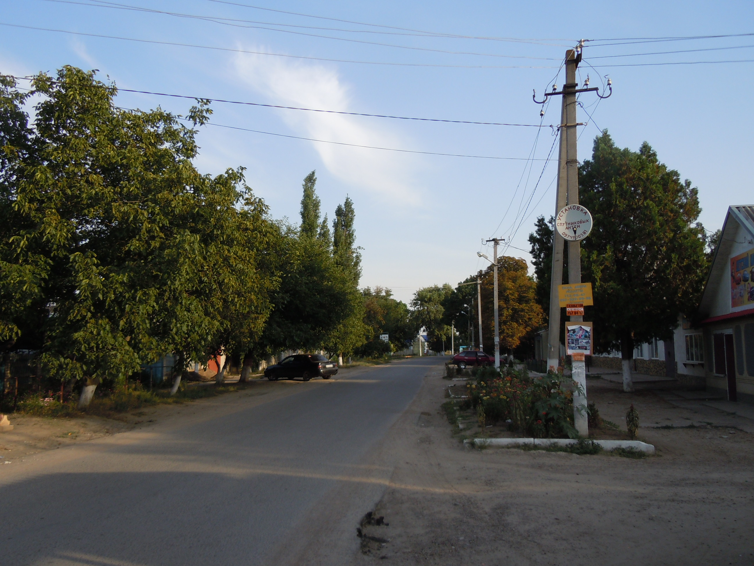 Село Яськи, Біляївський район, Одеська область